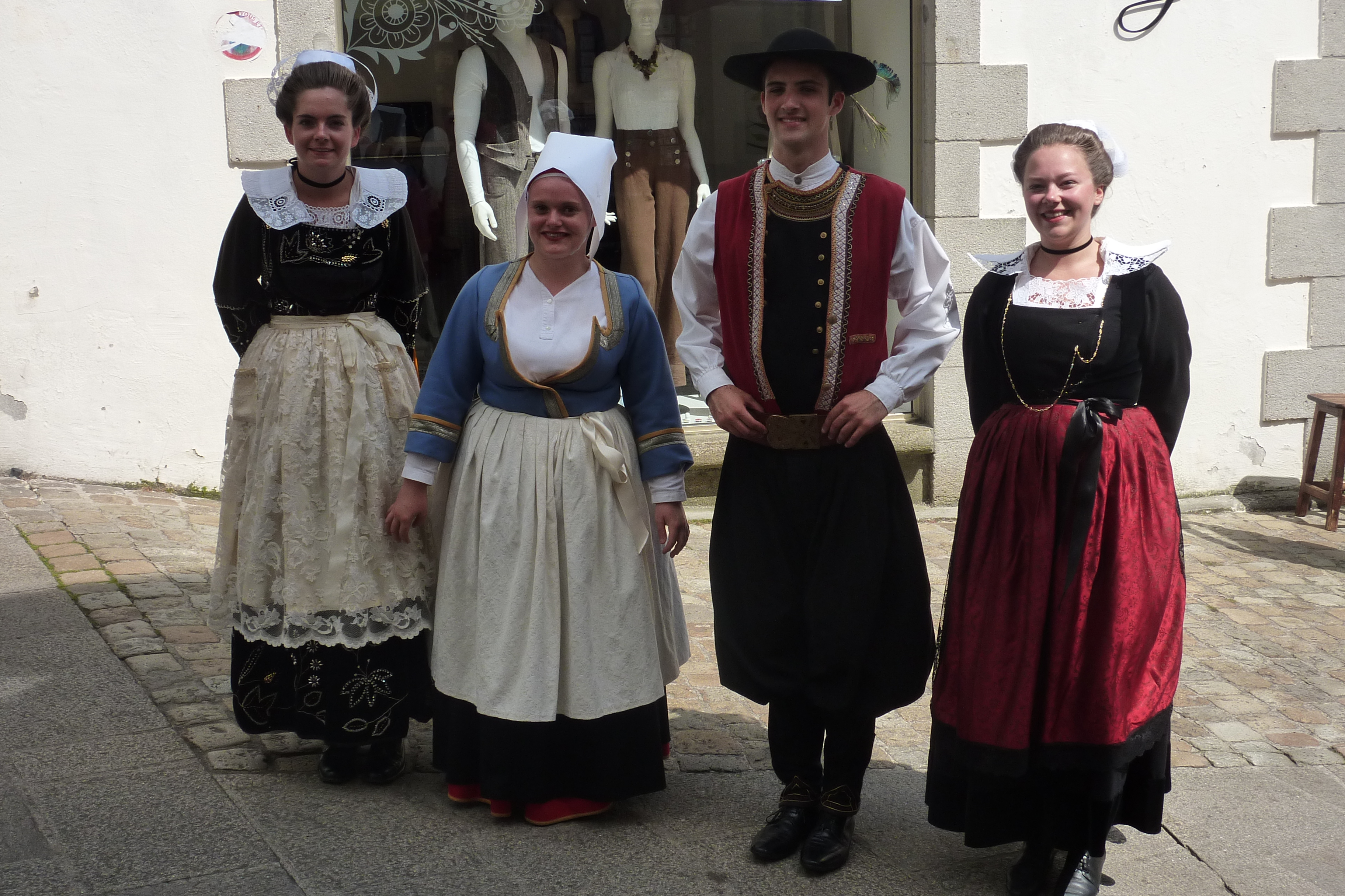 Quimper - Festival de Cornouaille 2014 - Breton Costume